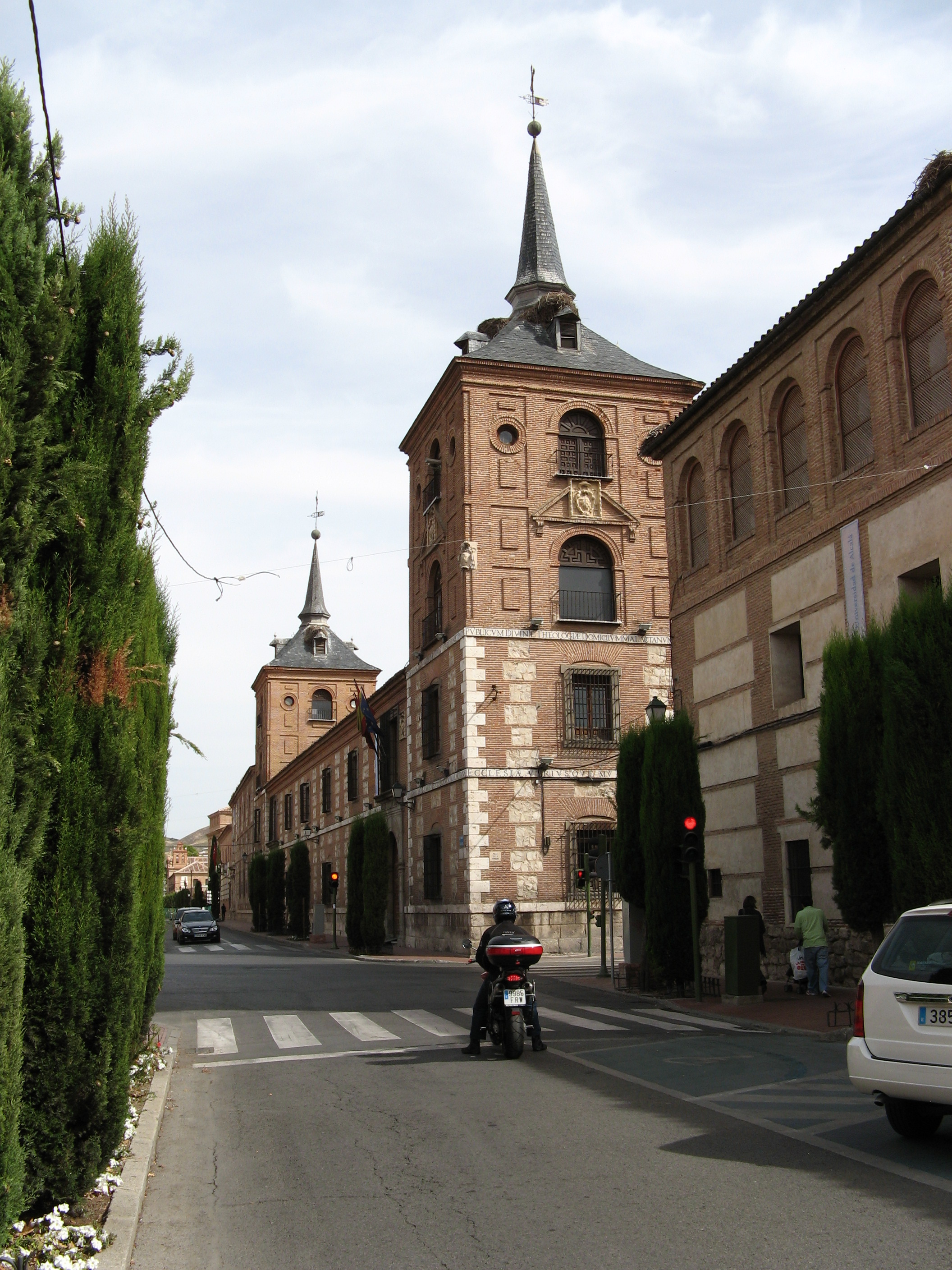 Calle Santa Úrsula. Alcalá de Henares. Comunidad de Madrid. España